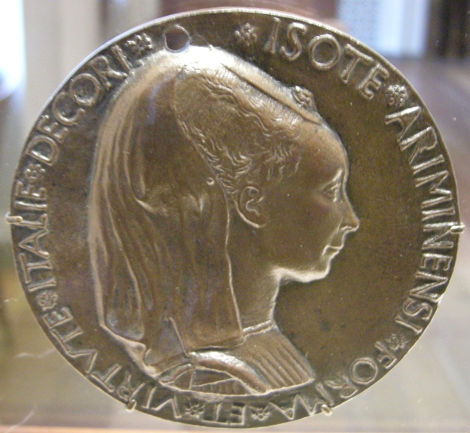 Matteo de' pasti, isotta degli atti, recto, 1453 circa